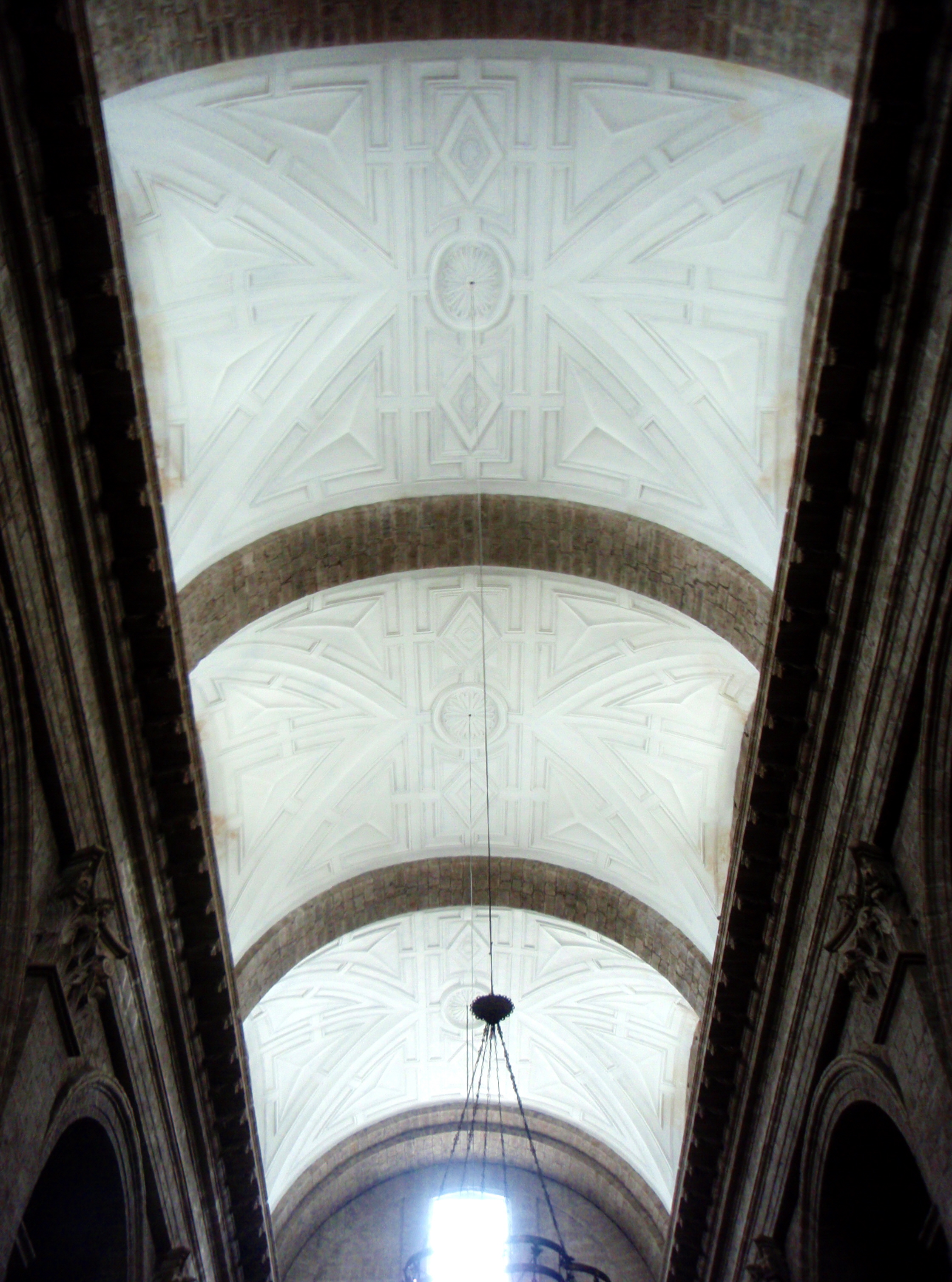 Catedral de Valladolid (España). Vista de la bóveda que cubre la nave central, construida a mediados del siglo XVII, con yeserías de ese momento.